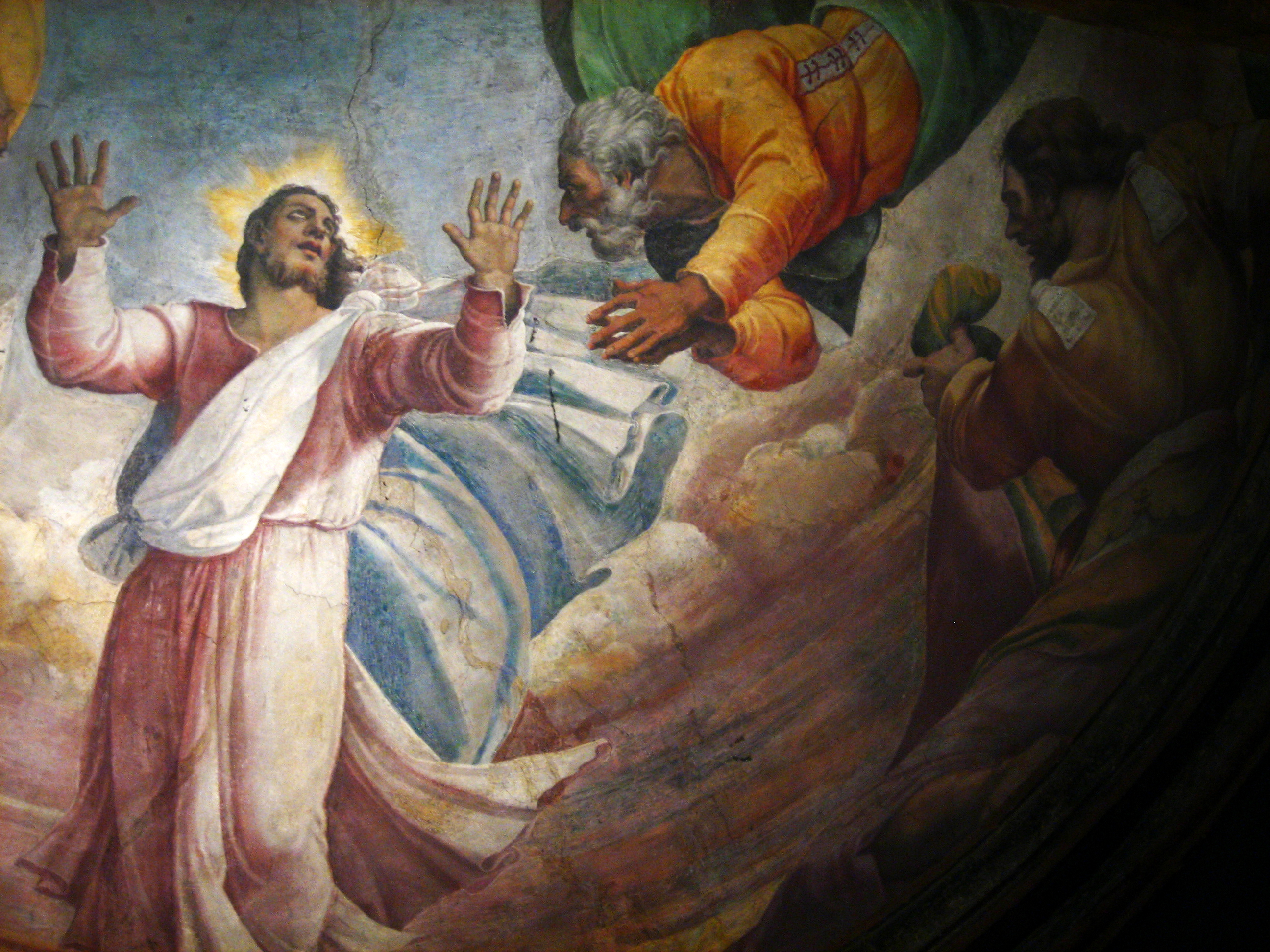 Fresco by Sebastiano del Piombo in S. Pietro in Montorio.